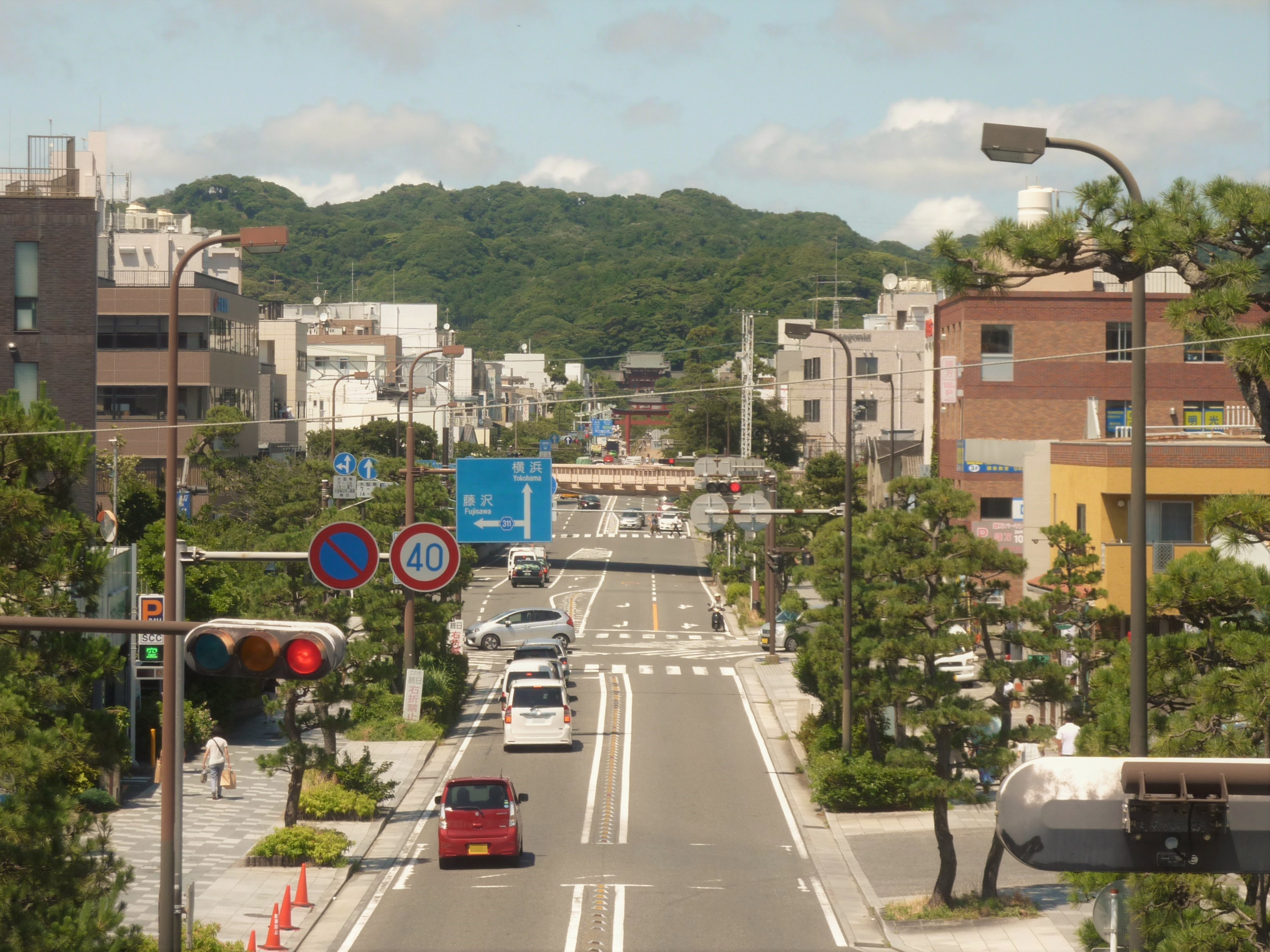 若宮大路の由比ガ浜歩道橋より鶴岡八幡宮方面を望む(神奈川県鎌倉市)